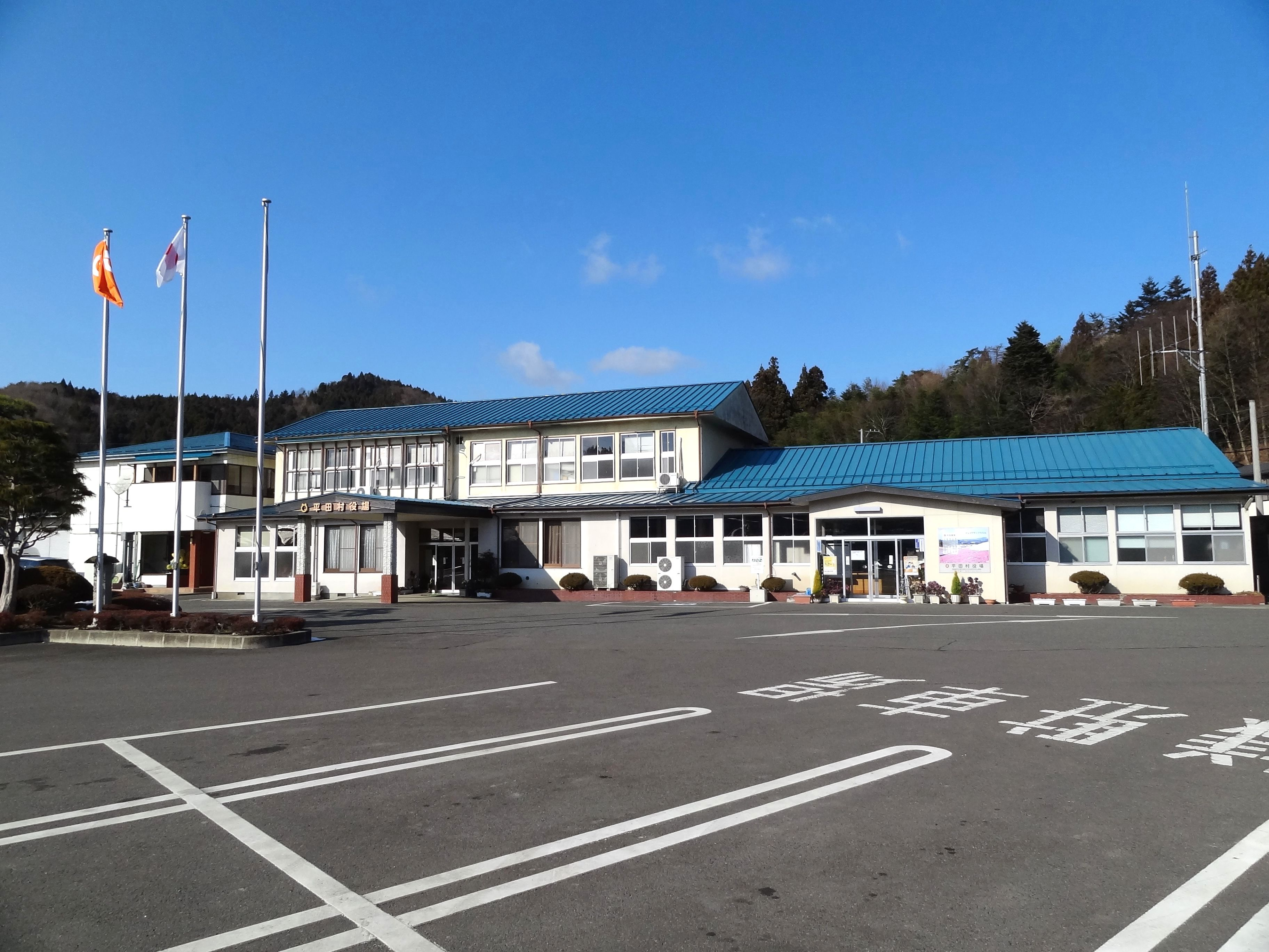 平田村役場